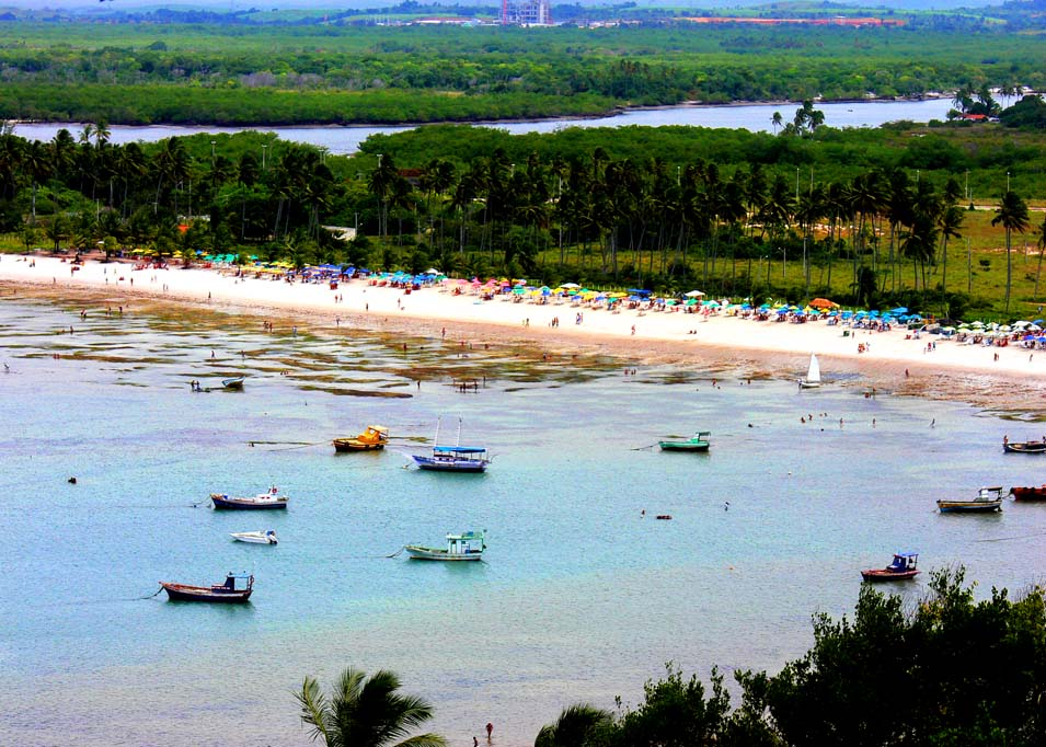 Turismo em cabo de Santo Agustinho-pe